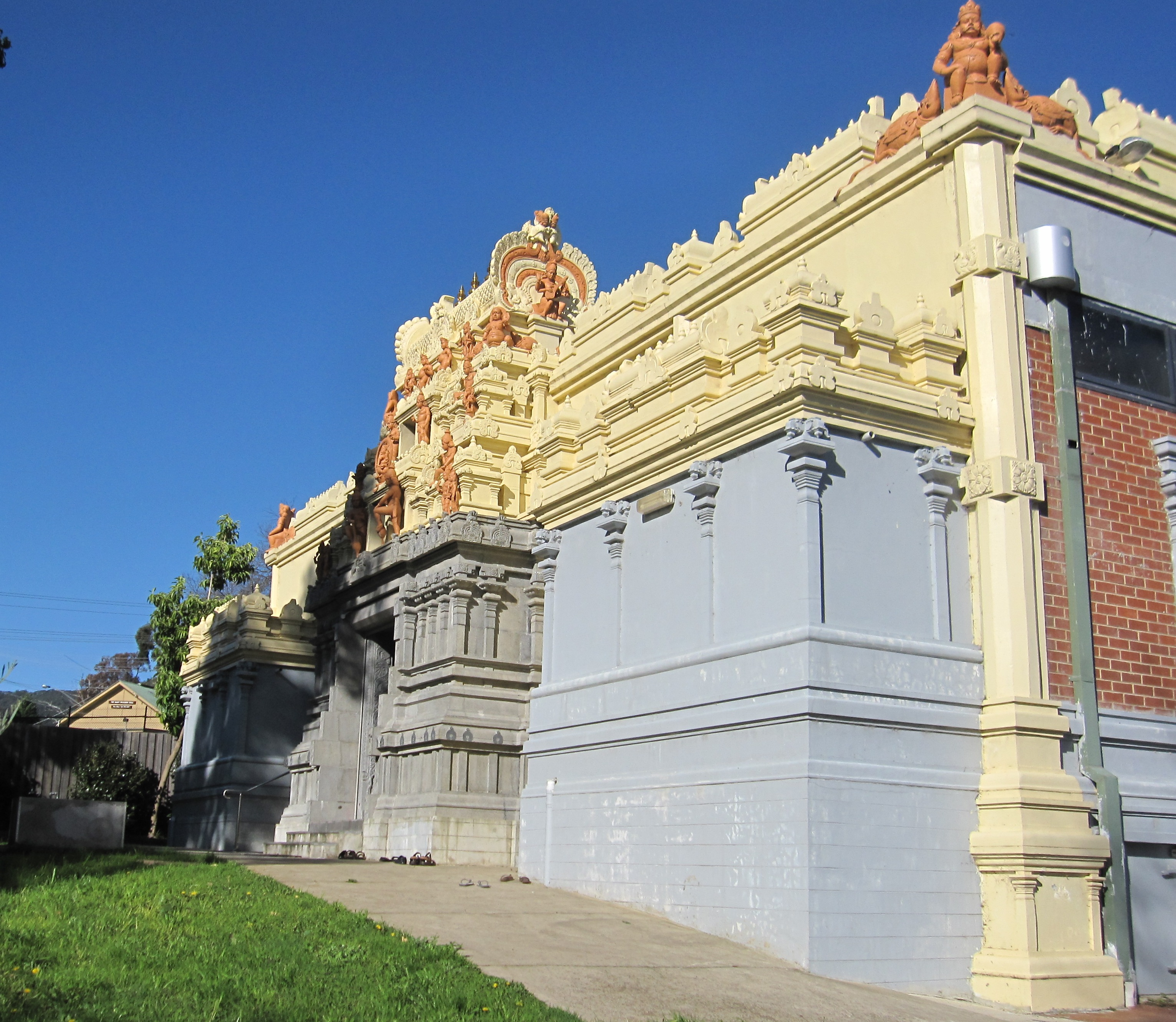 மெல்பேர்ண் வக்ரதுண்ட விநாயகர் கோயில்